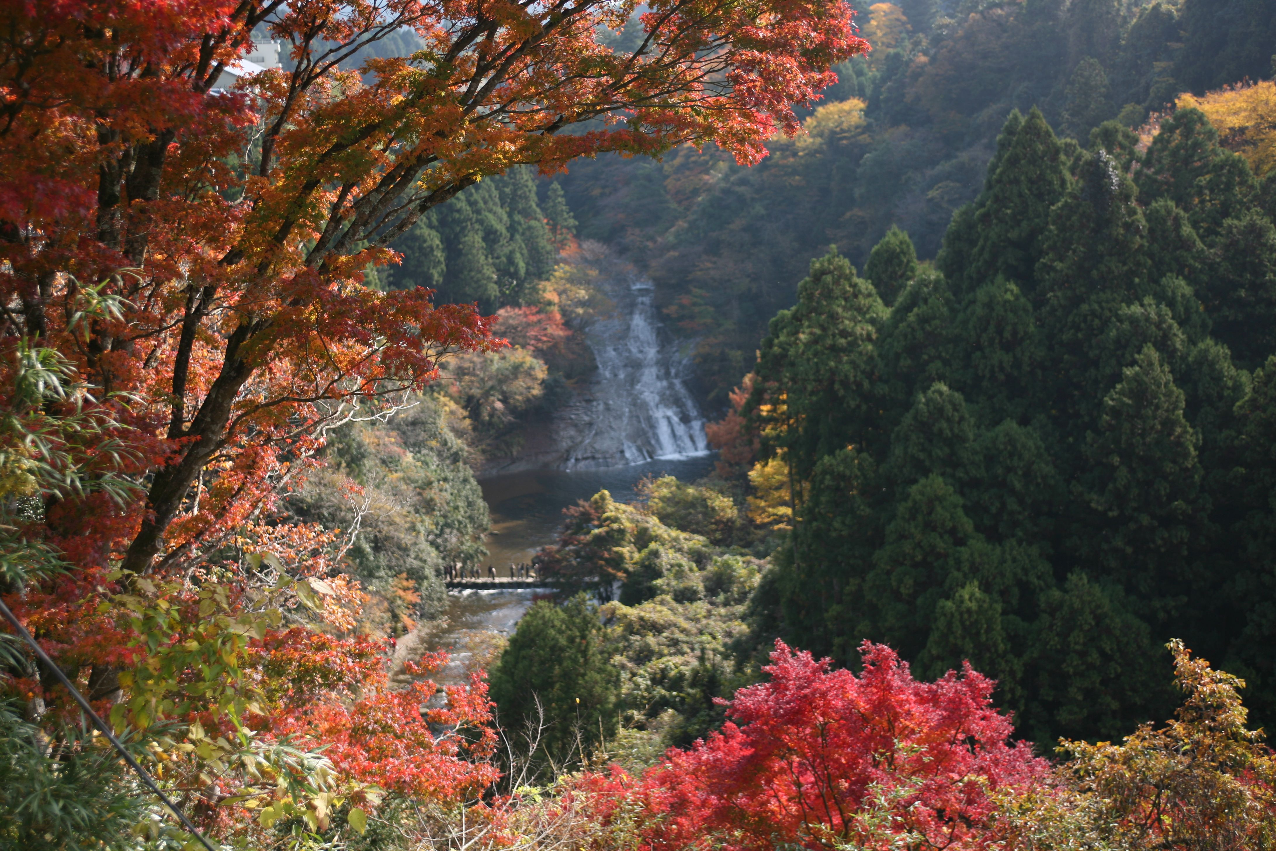 粟又の滝